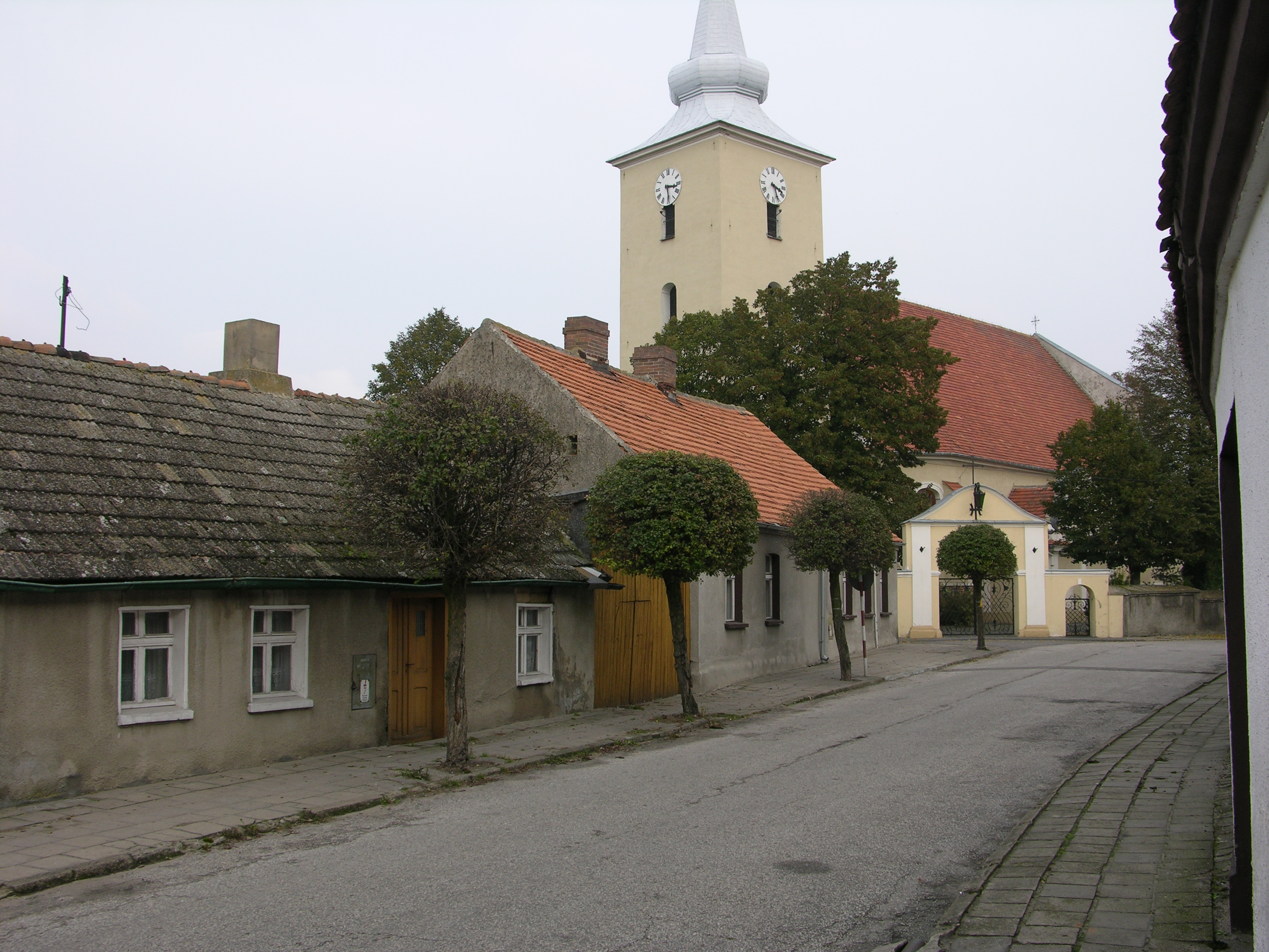 Kościół w Ostrorogu